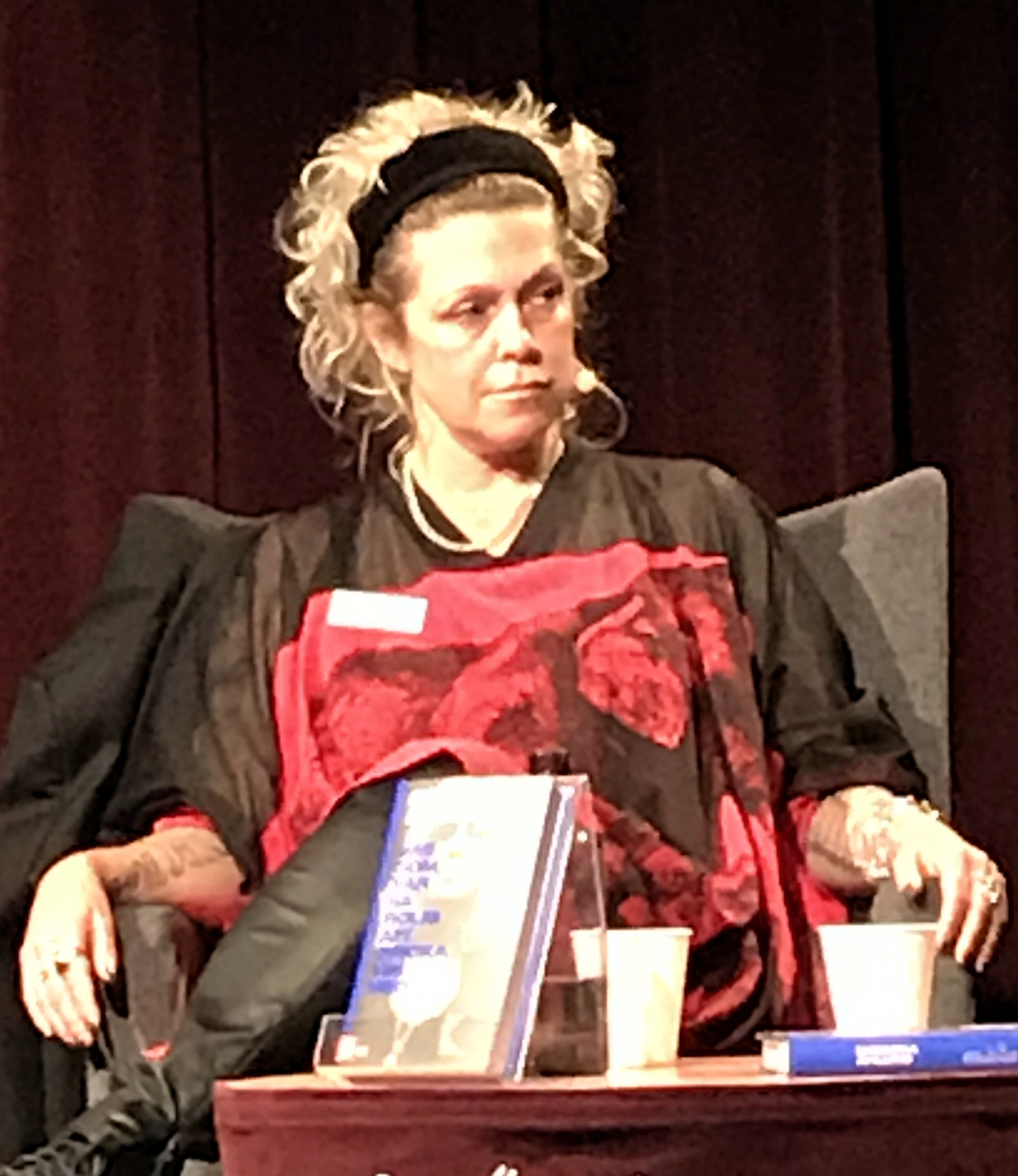 Rebecka Åhlund, på Bokmässan i Göteborg 2019.